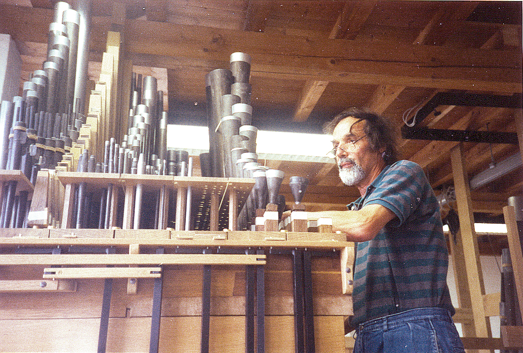 Jürgen Ahrend in seiner Werkstatt an der Schnitger-Orgel von St. Jacobi Hamburg, Deutschland.